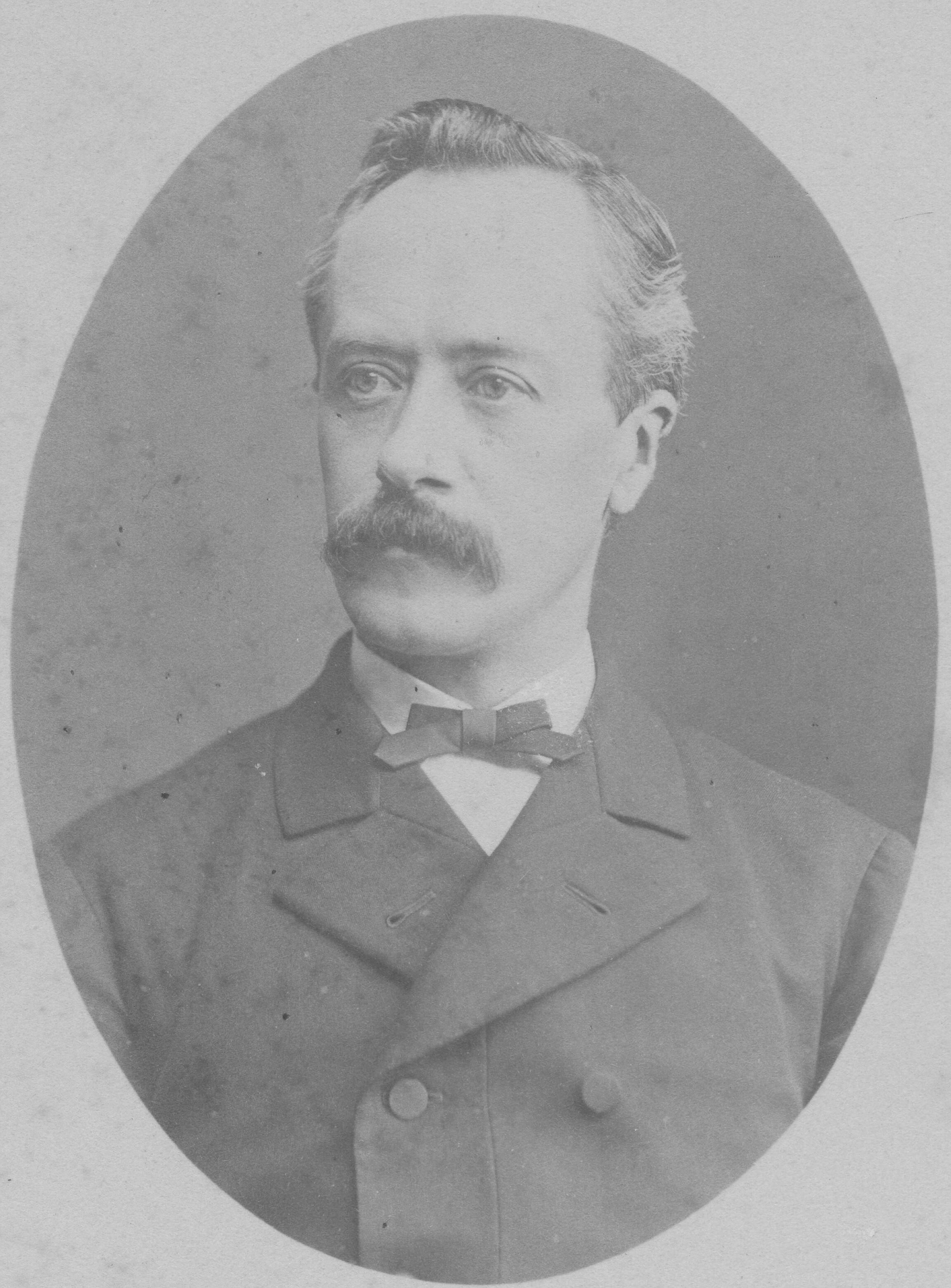 Portret van Henri Ernest Moltzer (hoogleraar)